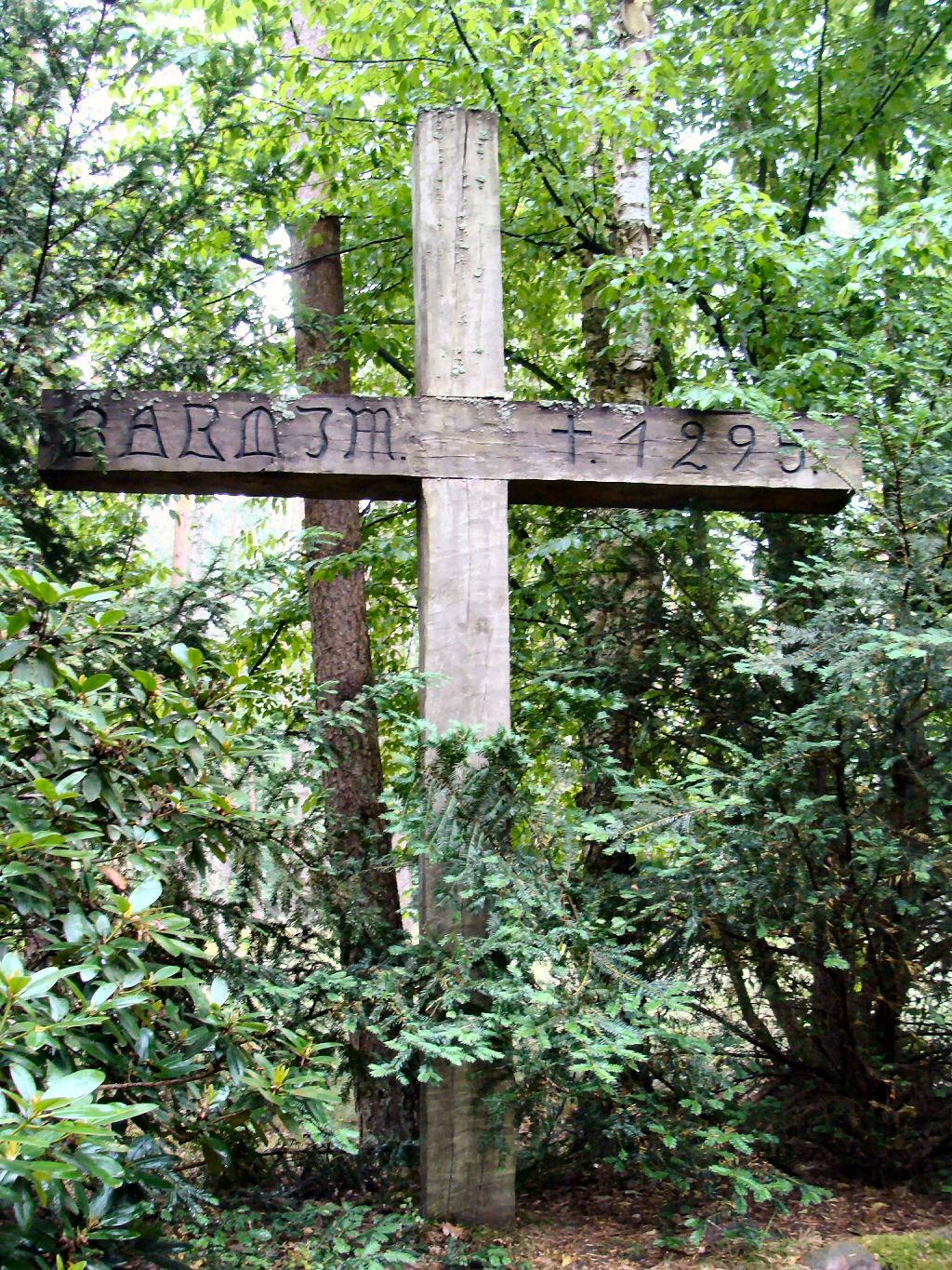 Dobieszczyn - krzyż Barnima II